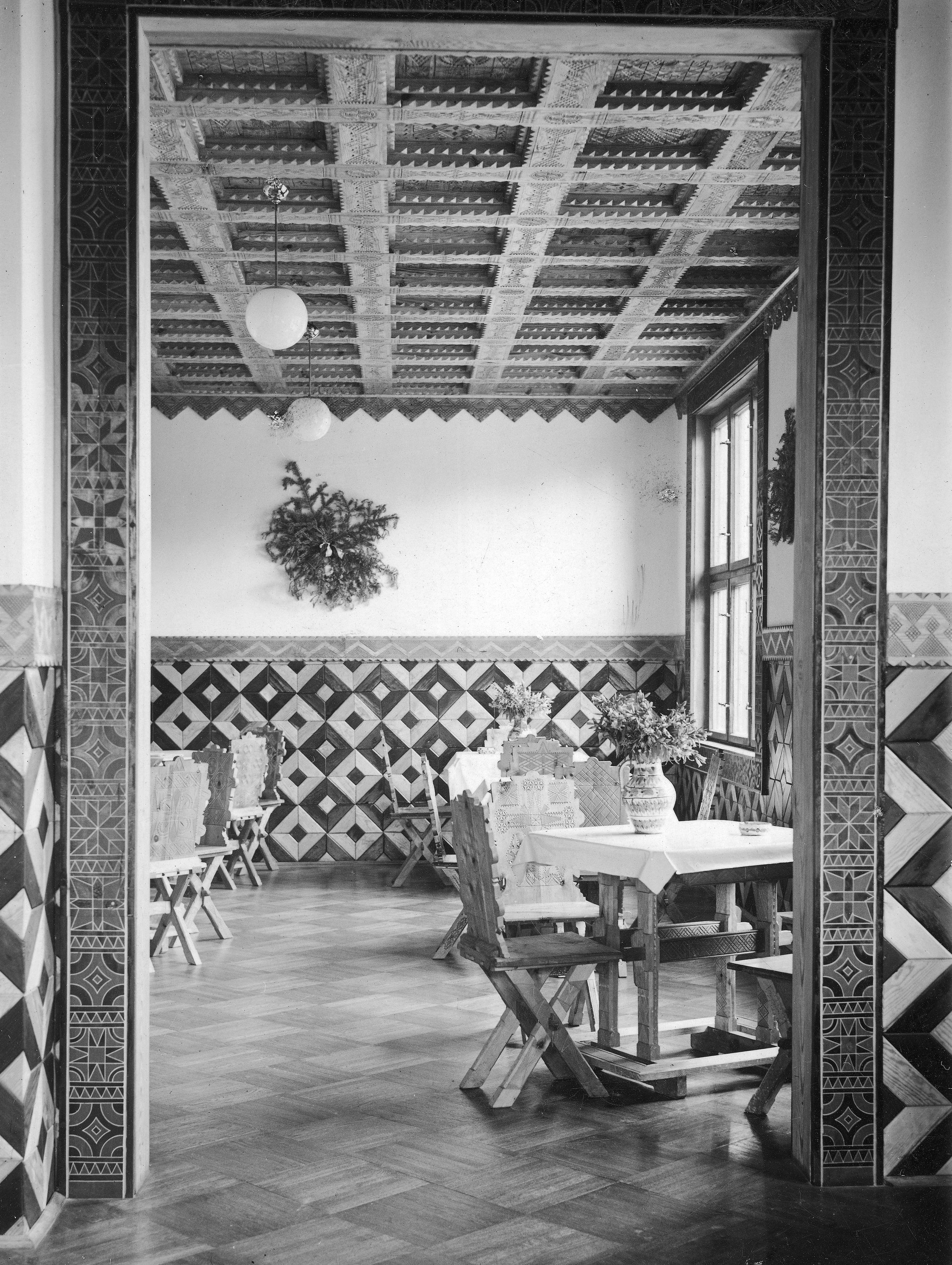 Schronisko PTN w Siankach - wnętrze